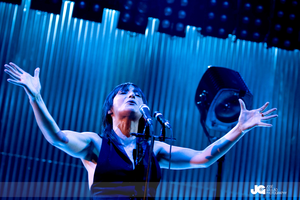 Clã